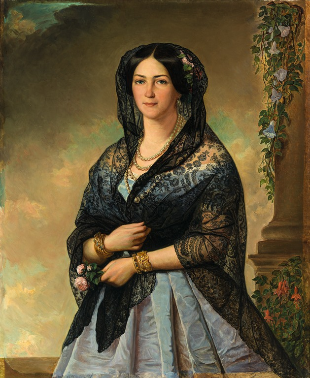 худ. Алексис-Жозеф Периньон. Аврора Карамзина. 1853 Художник Алексис-Жозеф Периньон, 1853 Холст, масло Национальный музей Финляндии (Хельсинки)